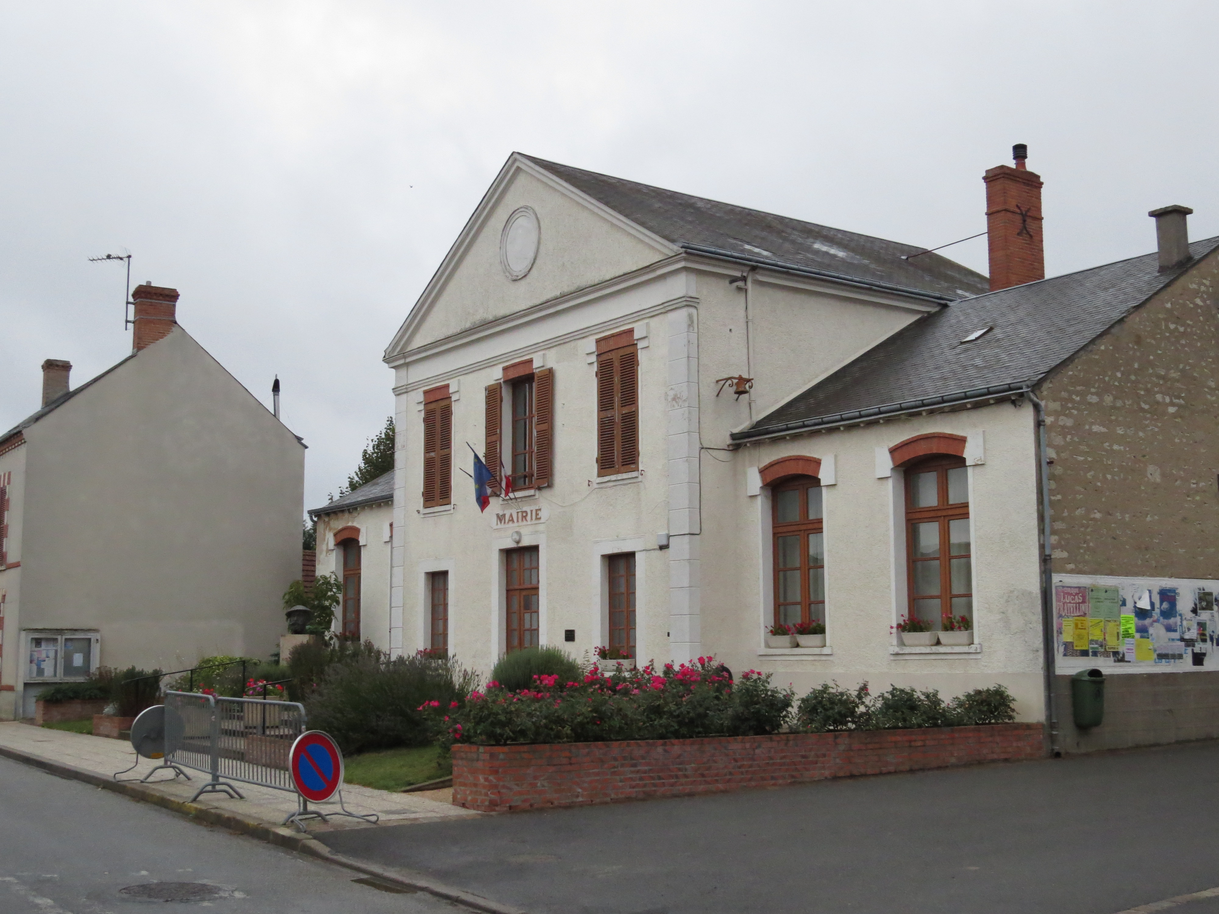 Mairie d'Escrennes (45)